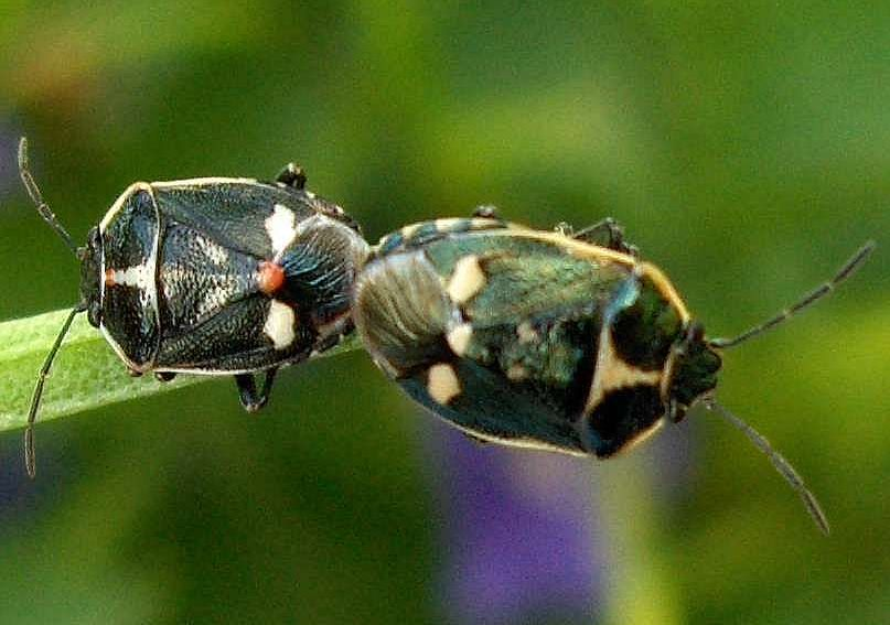 Par av kåltege Eurydema oleracea.Template:Byline